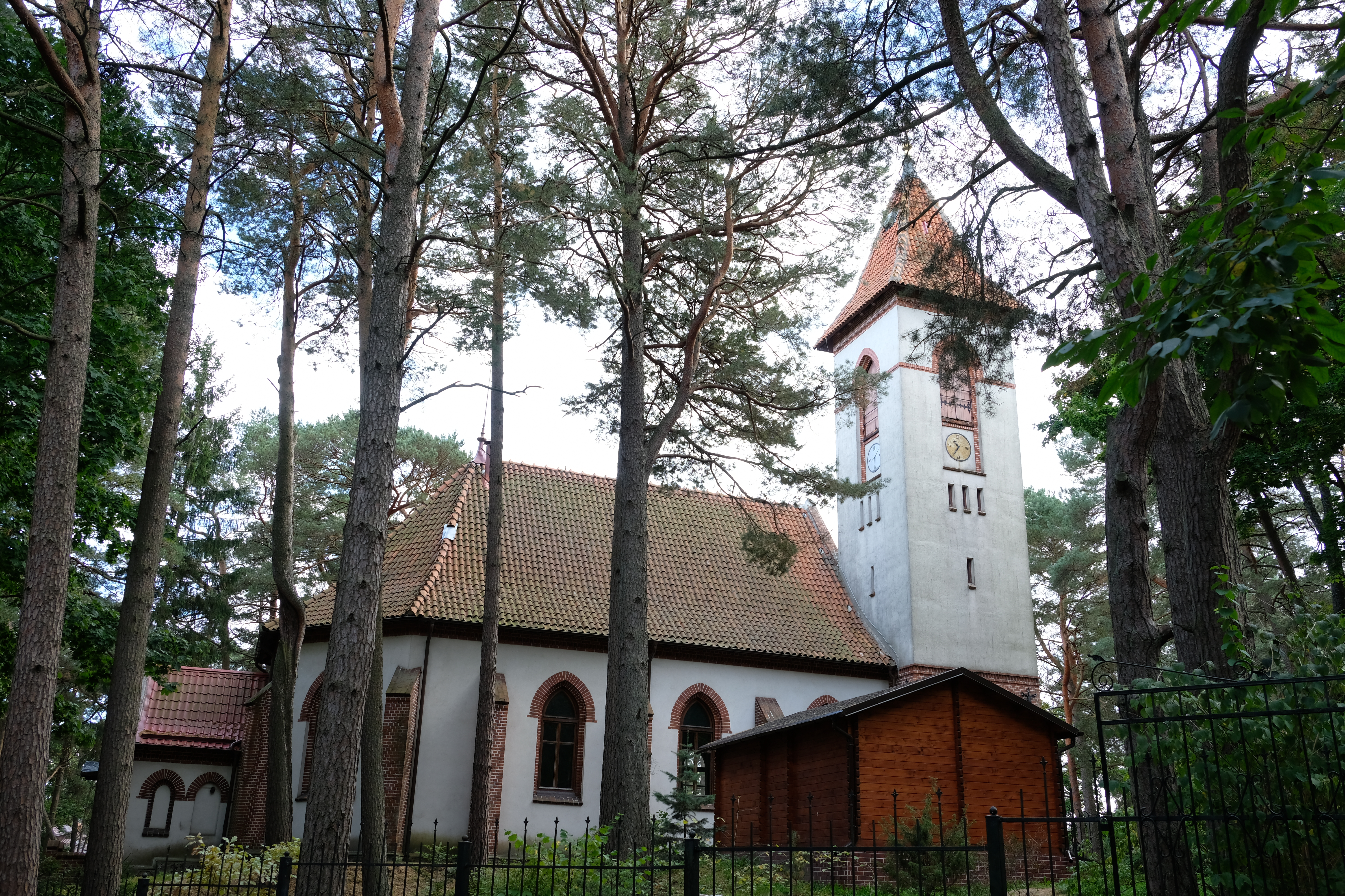 Приходская церковь: улица Баха, 4, Светлогорск, Светлогорский район, Калининградская область